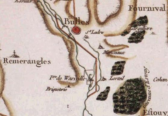 Bulles (60), carte de Cassini.